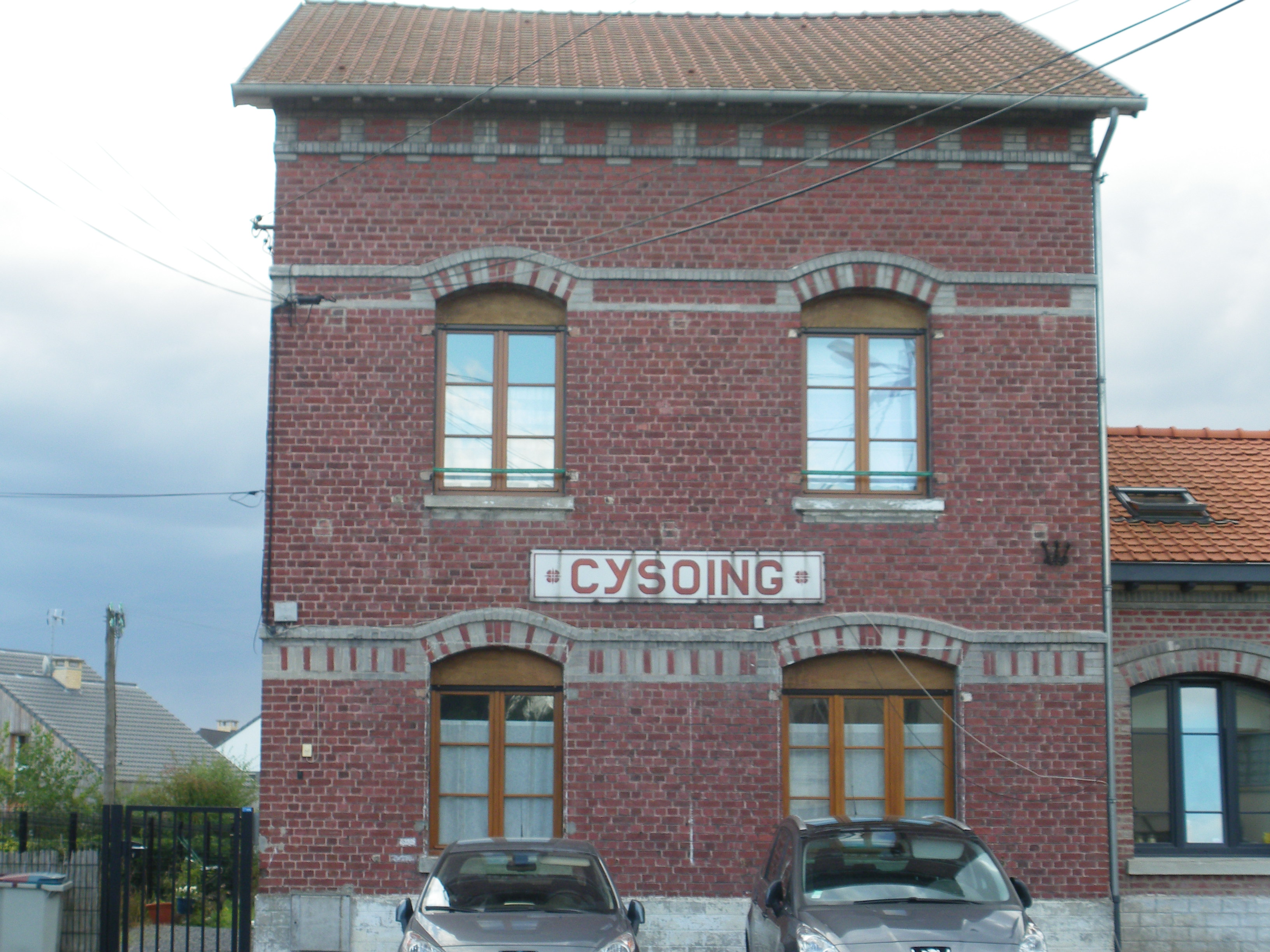 Vue de l'ancien bâtiment principal de la gare de Cysoing.